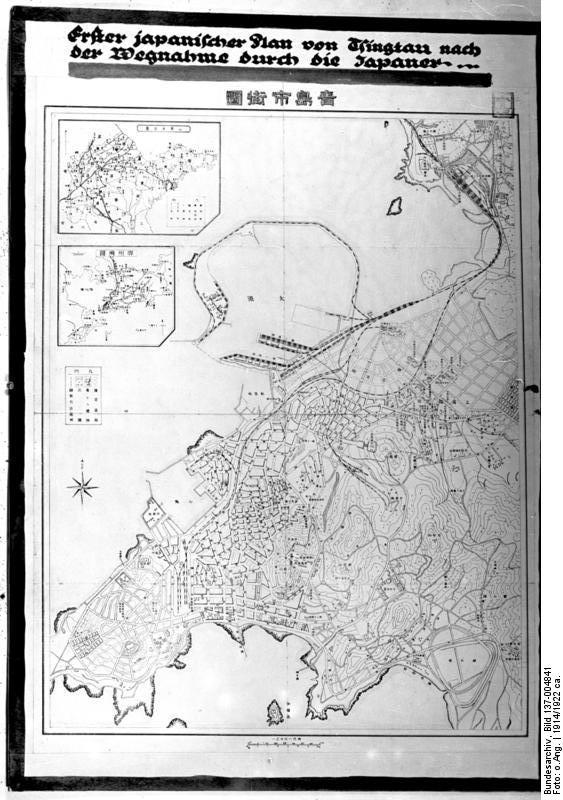 Tsingtau, Erster japanischer Plan China, Tsingtau Erster japanischer Plan von Tsingtau nach der Wegnahme durch die Japaner.